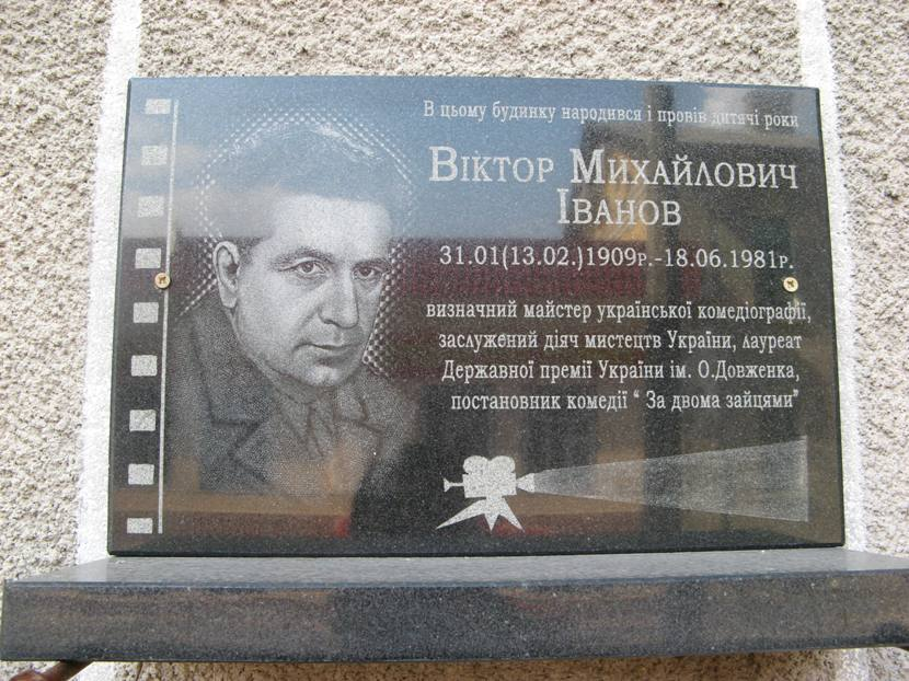 Меморіальна дошка, встановлена на будинку, де народився режисер Віктор Іванов